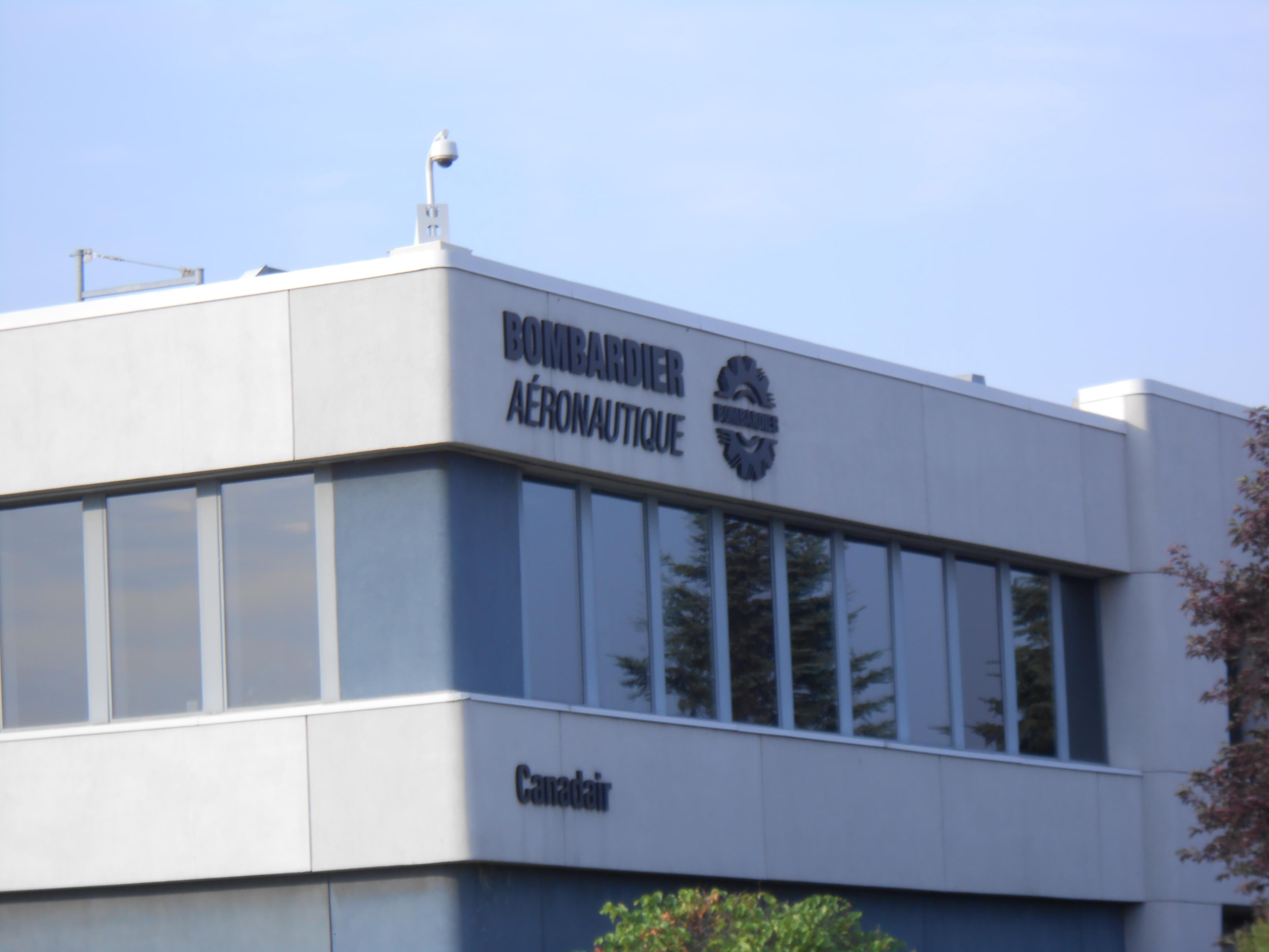 Bombardier aéronautique, 1800, boulevard Marcel-Laurin, Saint-Laurent, Montréal